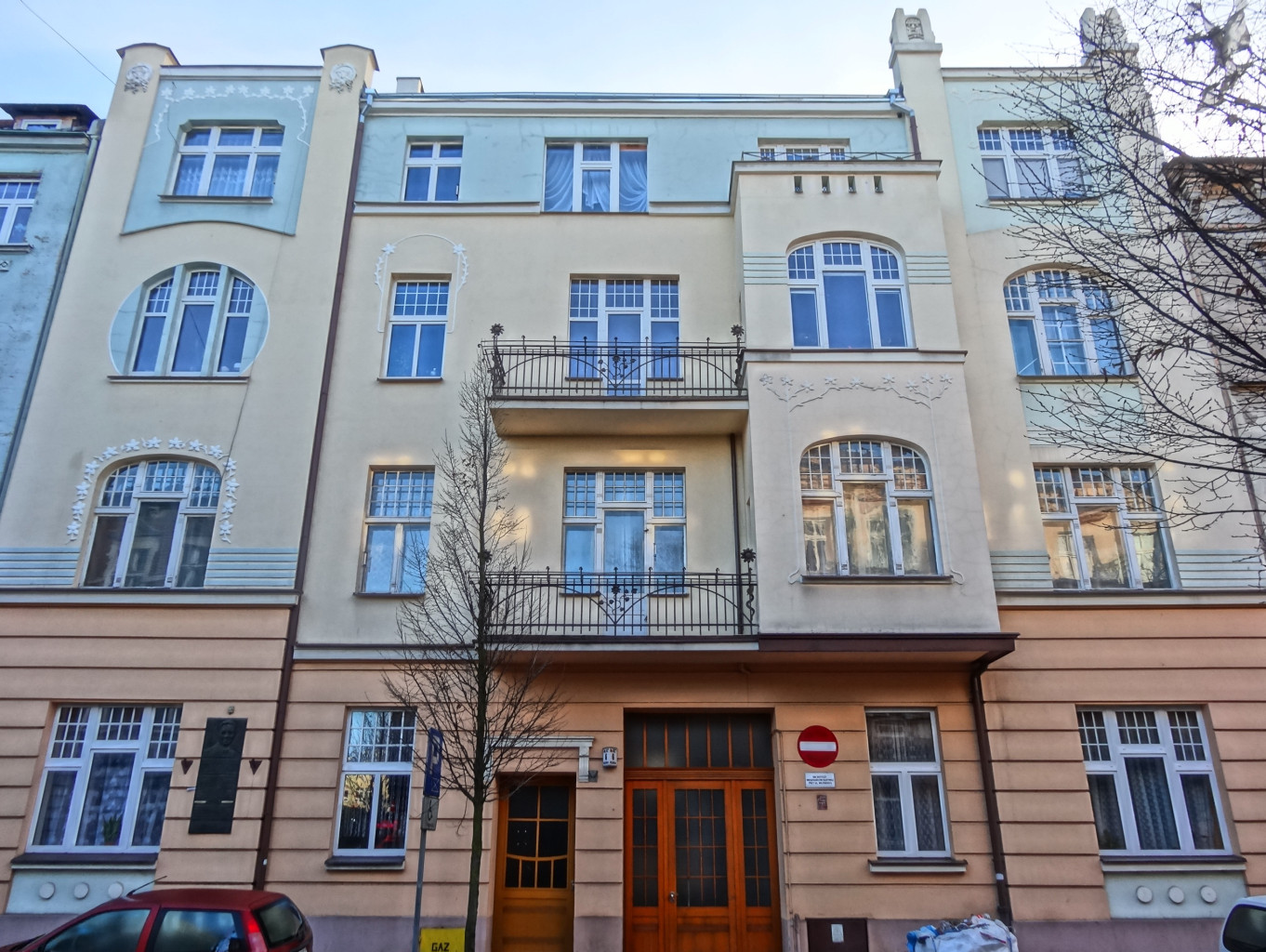 Kamienica ul. Wileńska 6 w Bydgoszczy (1903)